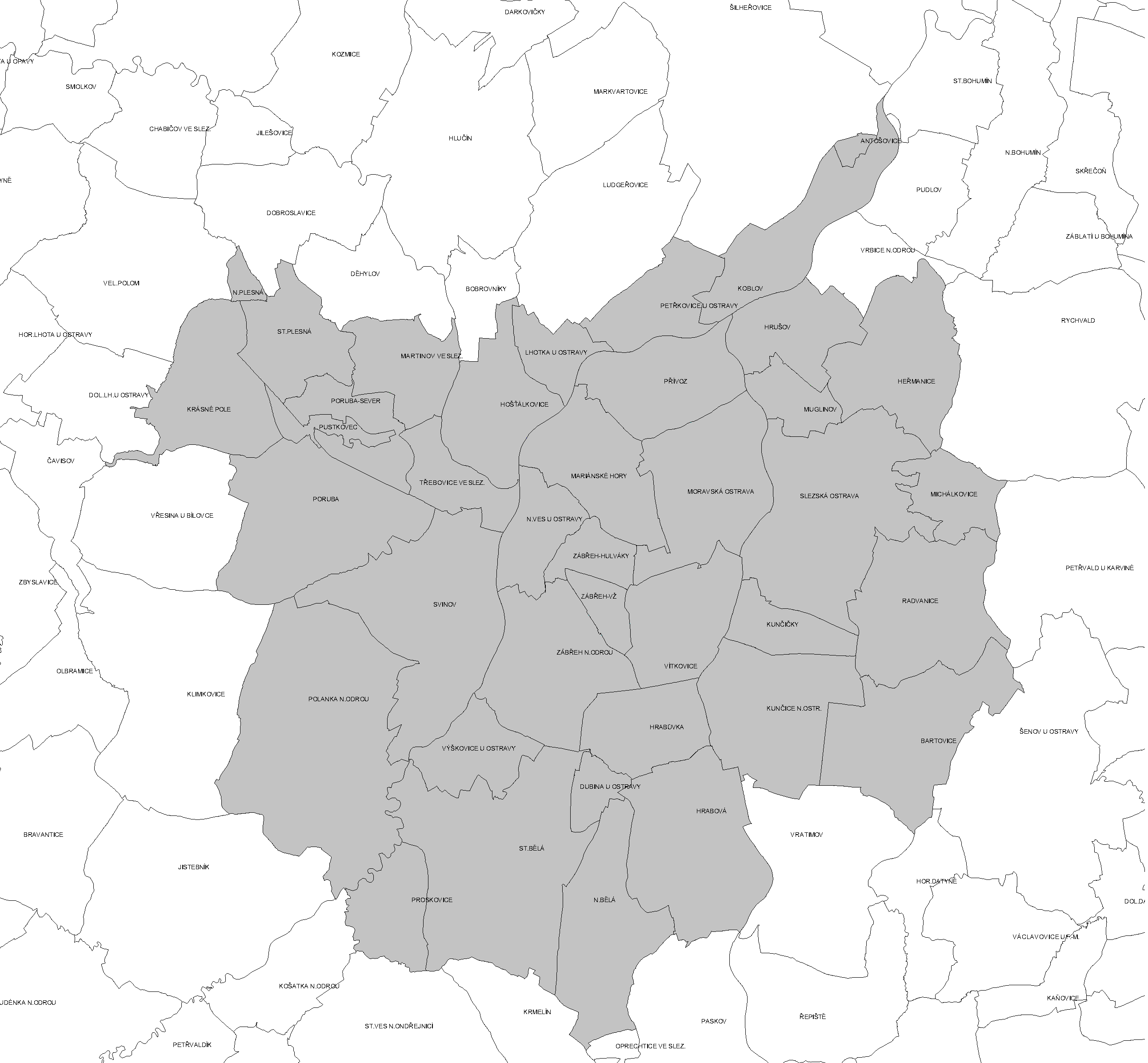 Katastrální území Ostravy